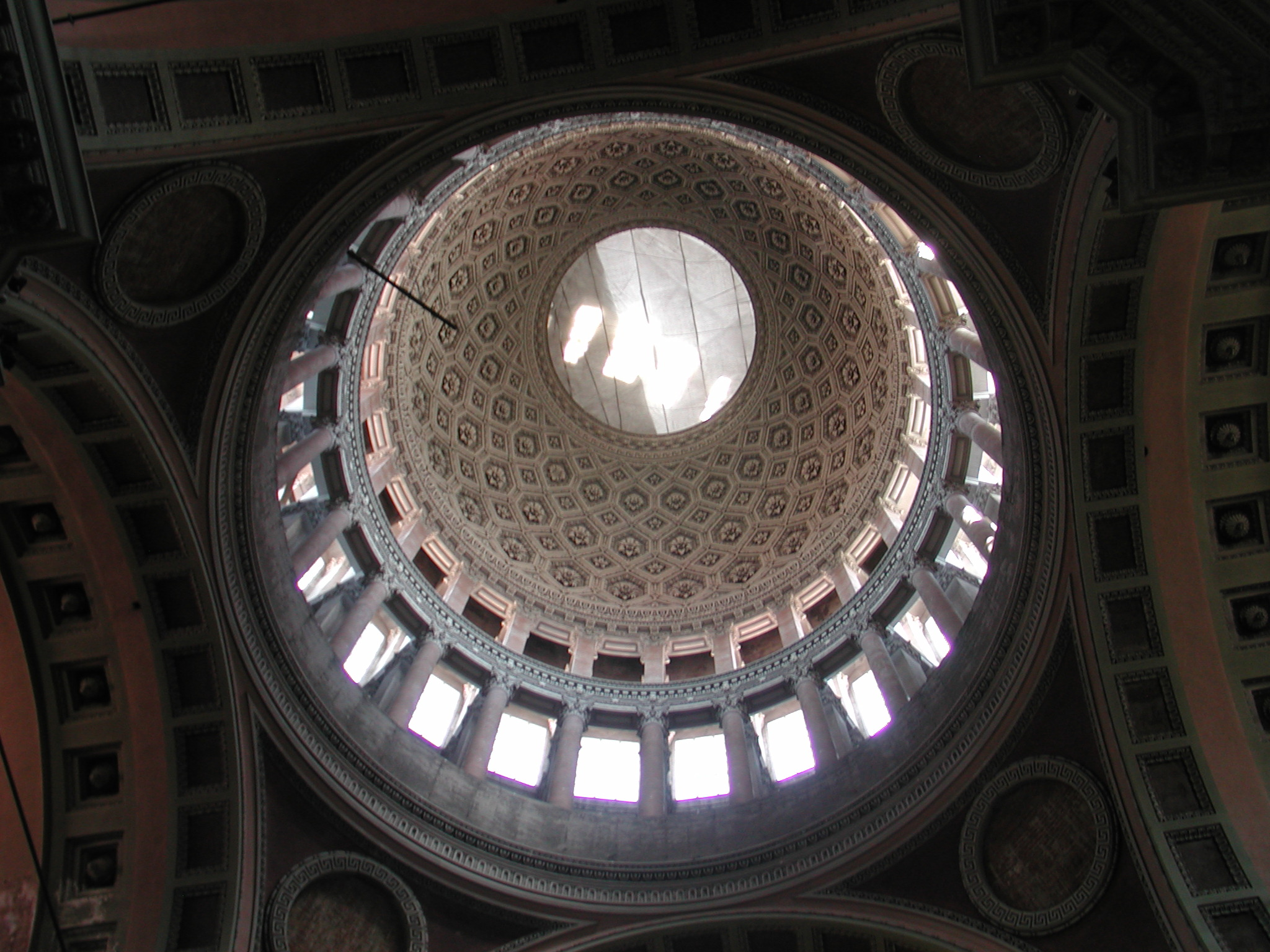 Novara, Italy, basilica di san Gaudenzio.